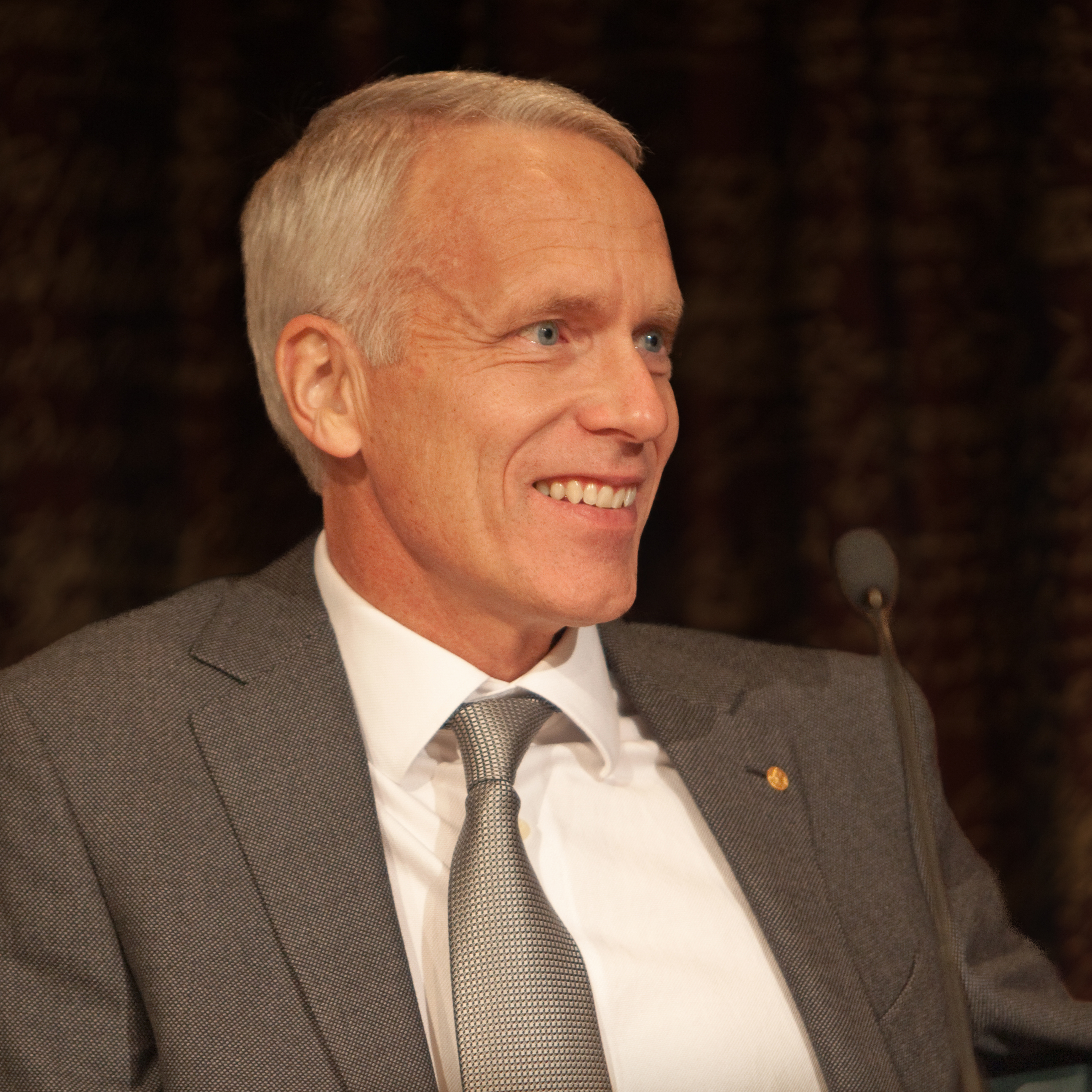 Brian Kobilka, Nobel Prize winner in chemistry 2012